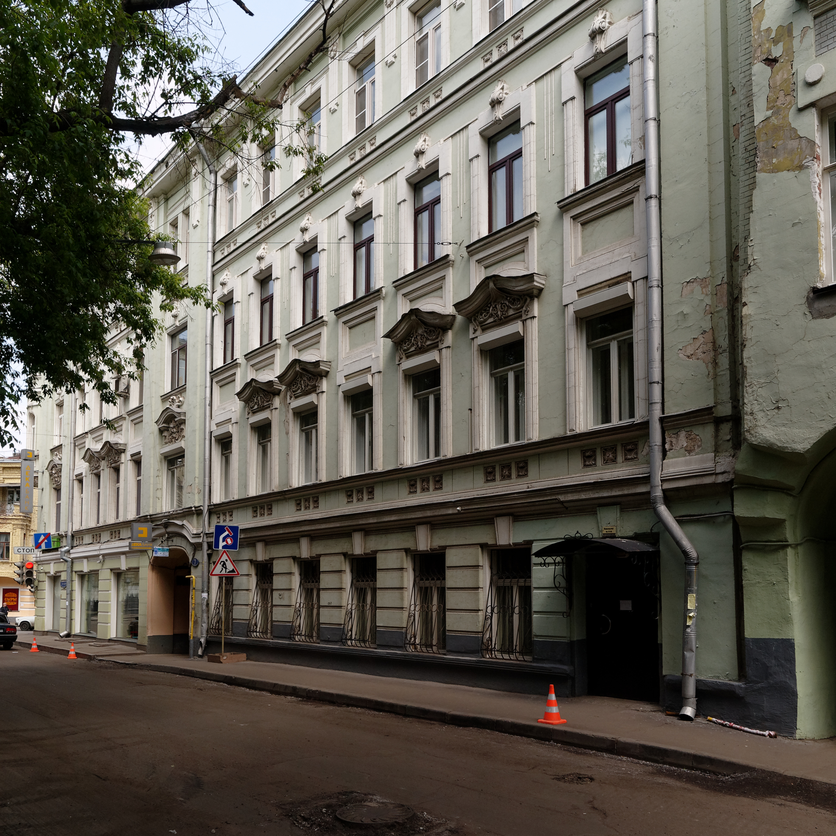 Москва. Лялин переулок. Перезаливка старых фото, ранее загруженных как in-camera jpeg, в обработке DXO PL2.